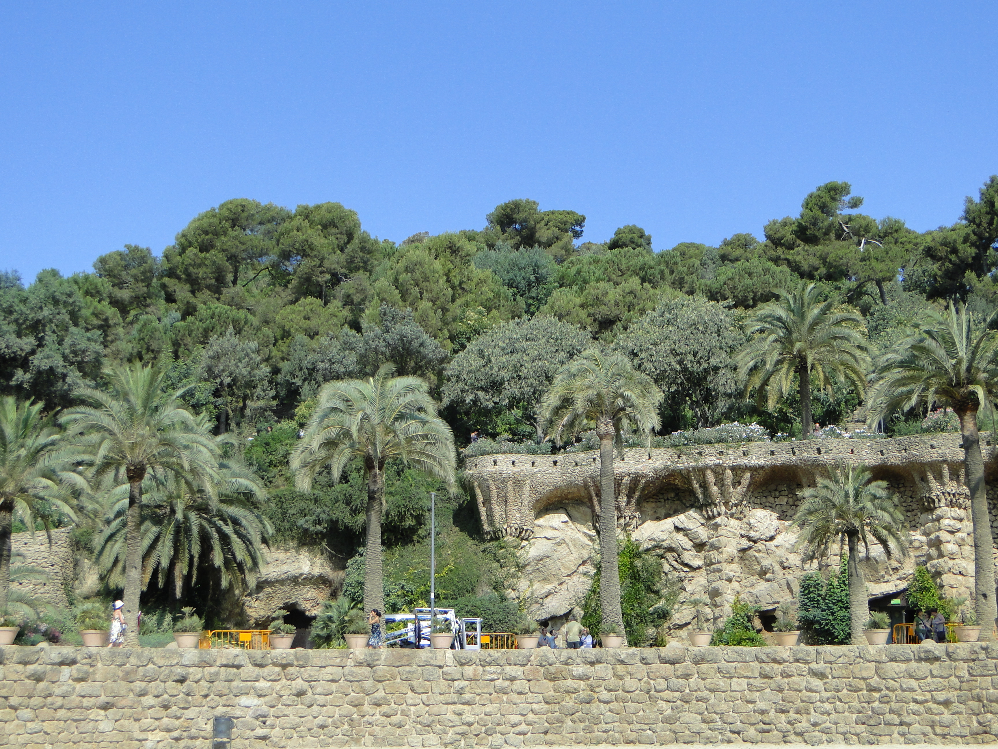 Parque Güell, Barcelona